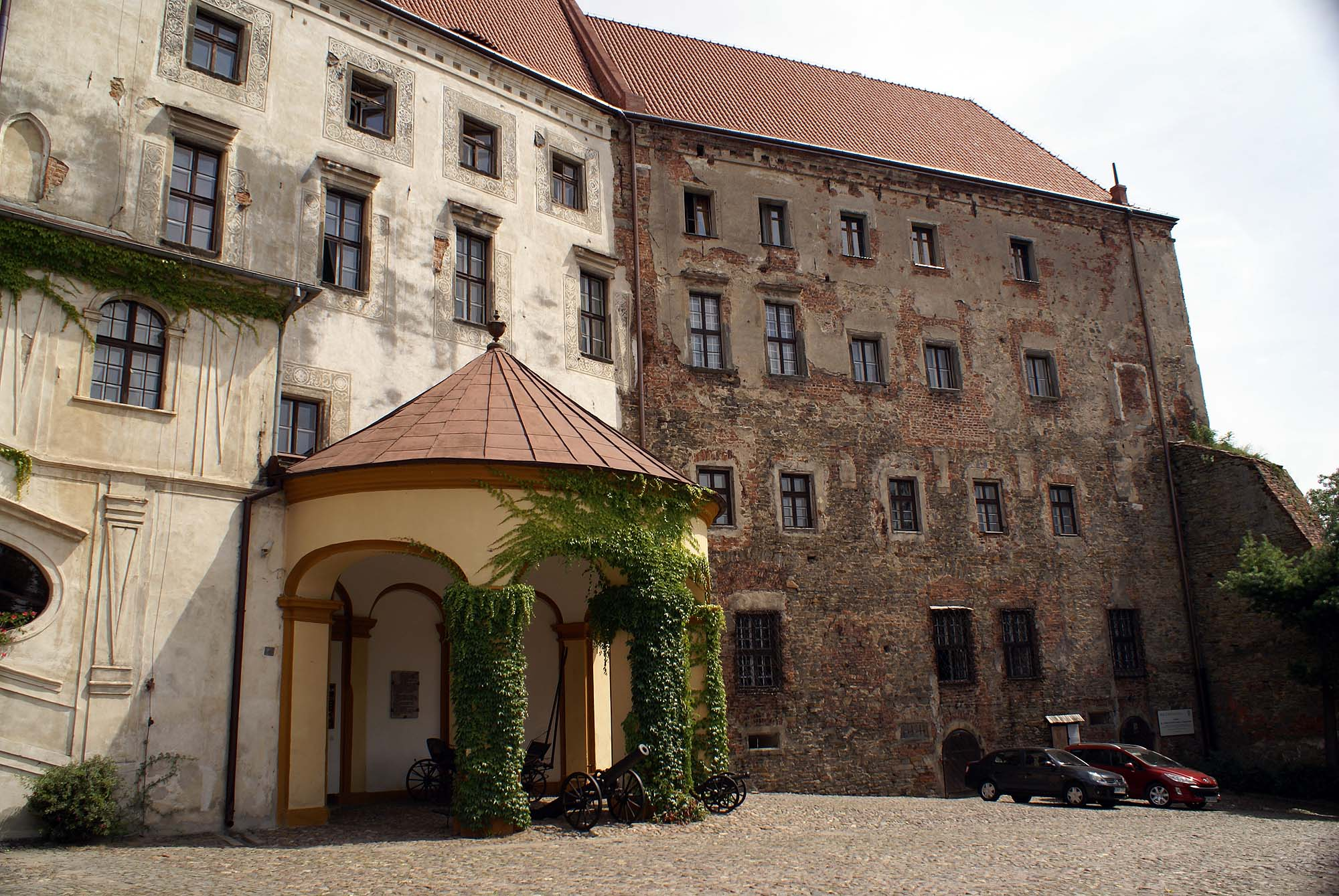 Otmuchów, zespół zamkowy, XIII, XVIII, XIX